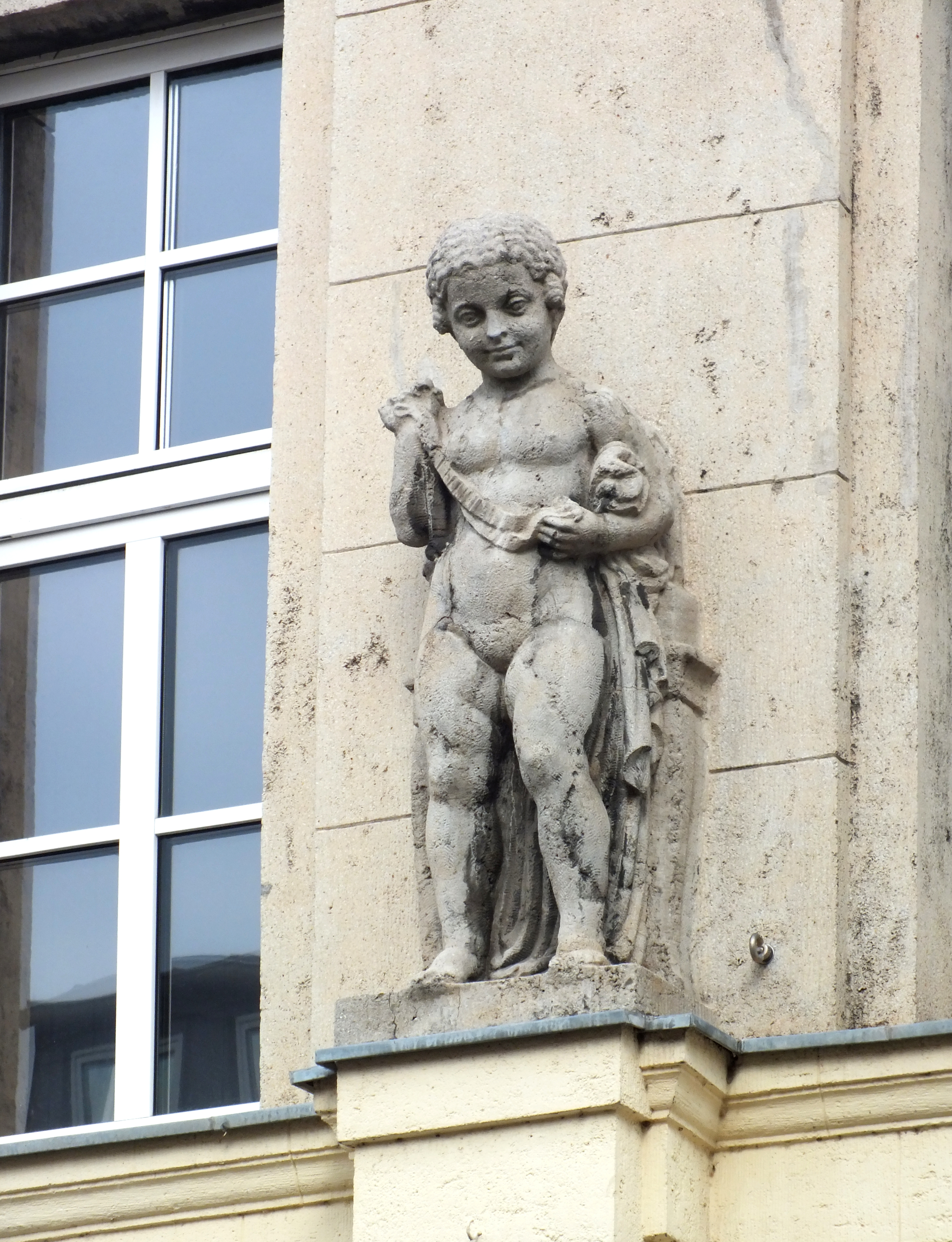 Aue in Sachsen, Bahnhofstraße, Kaufhaus Weichhold